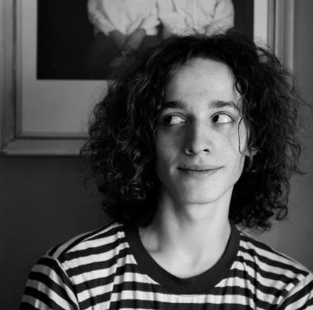 Jan Battěk